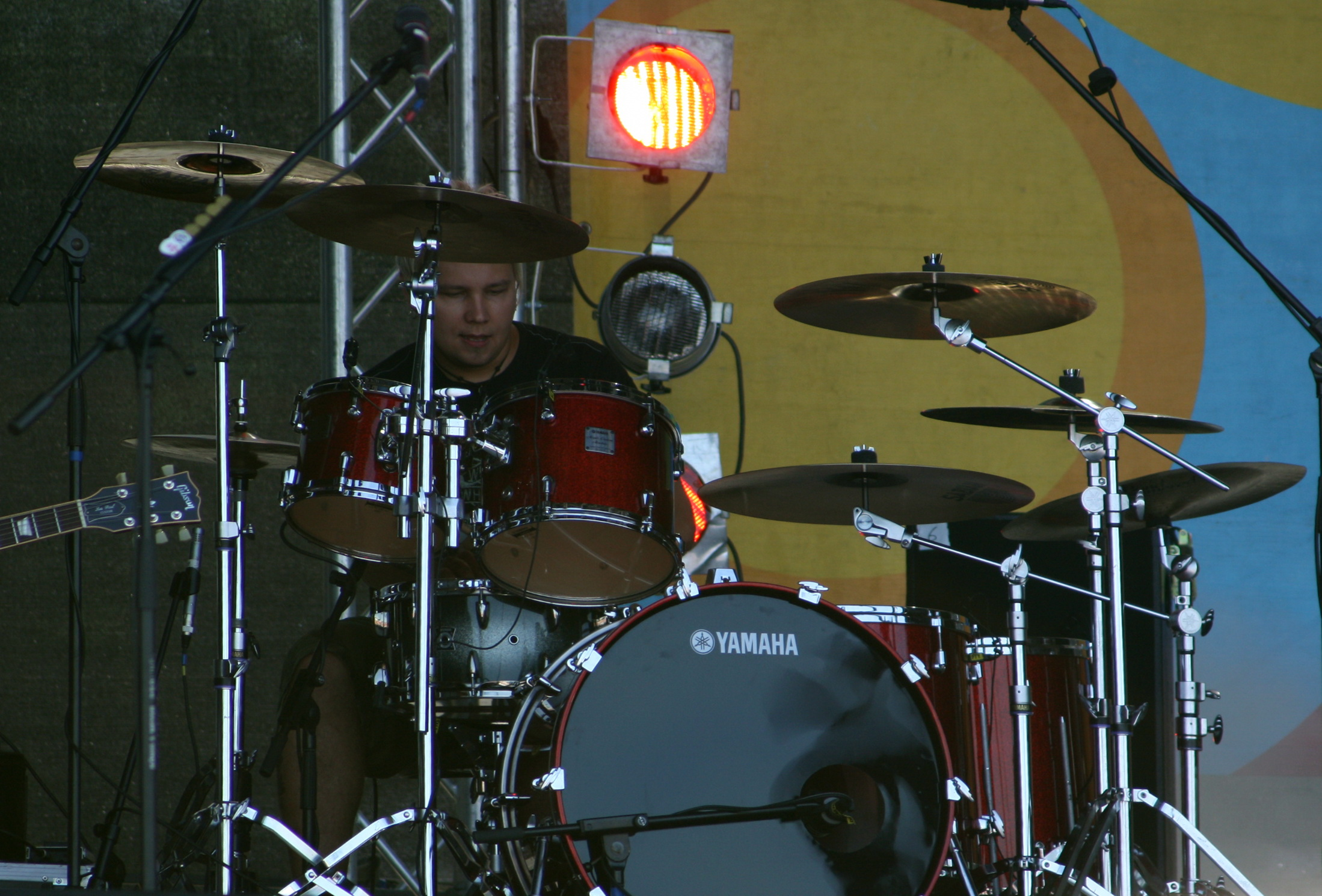 Sunrise Avenue - Schlagzeuger Sami Osala